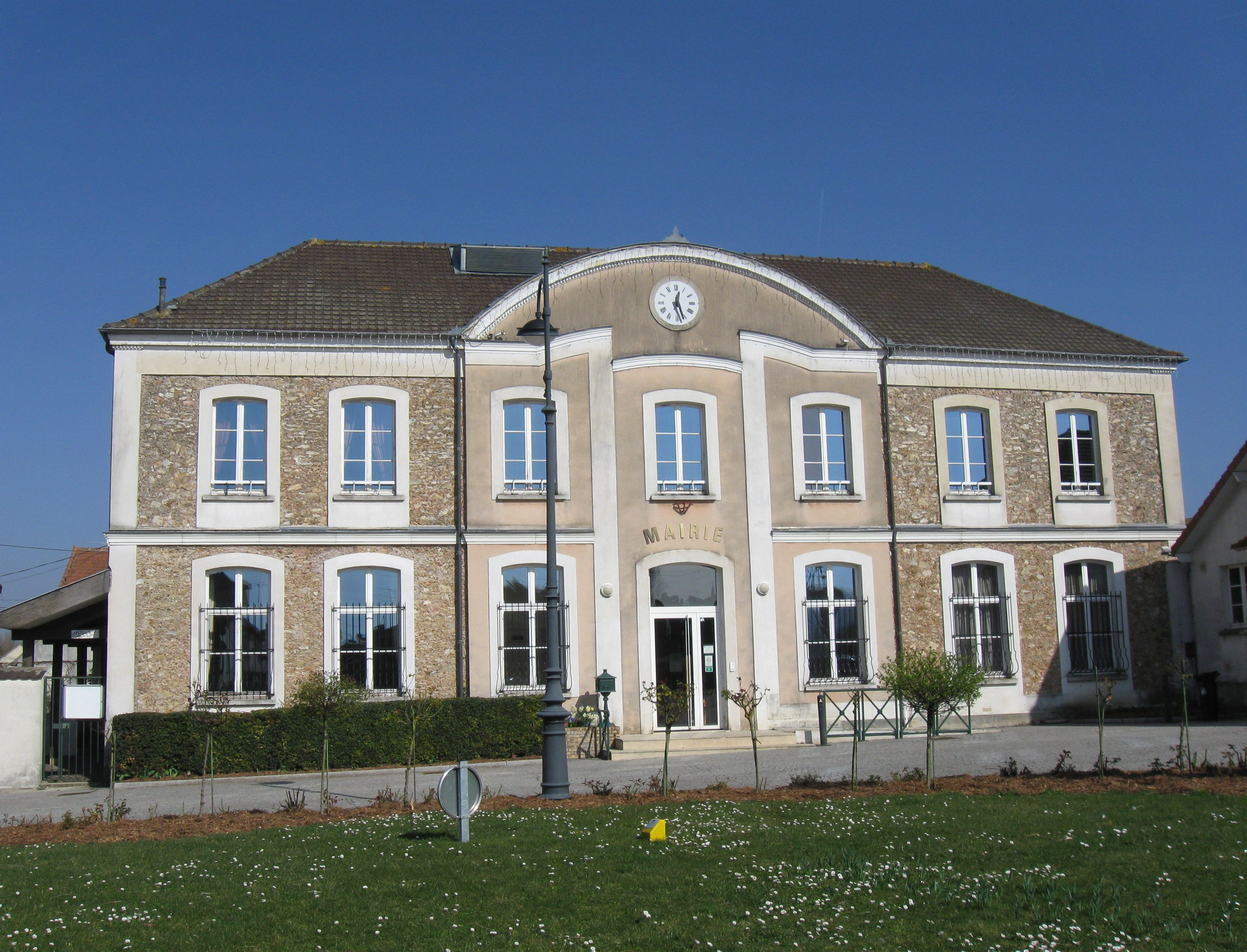 Mairie de Mareuil-lès-Meaux (Seine-et-Marne, région Île-de-France).